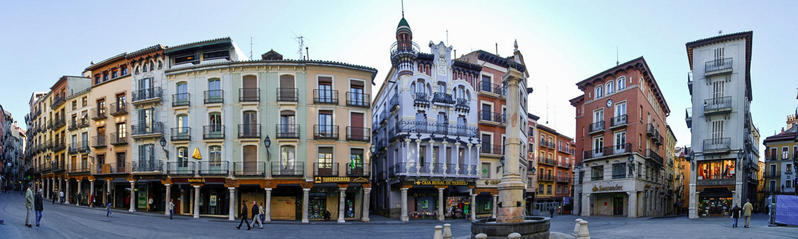 ¿donde está el torico?